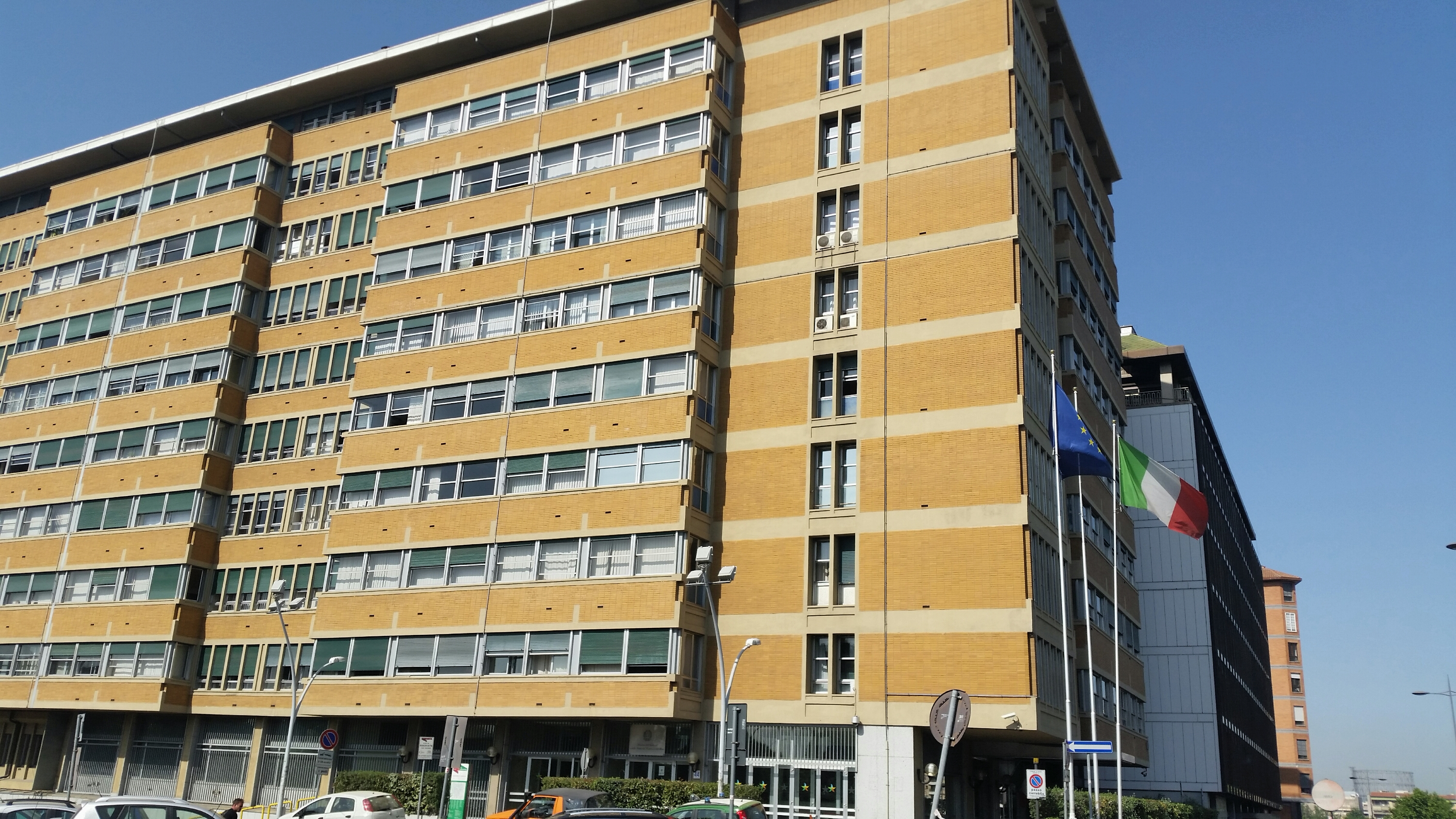 Sede del Ministero dell'Ambiente e della Tutela del Territorio e del Mare. Roma, via Cristoforo Colombo, 44